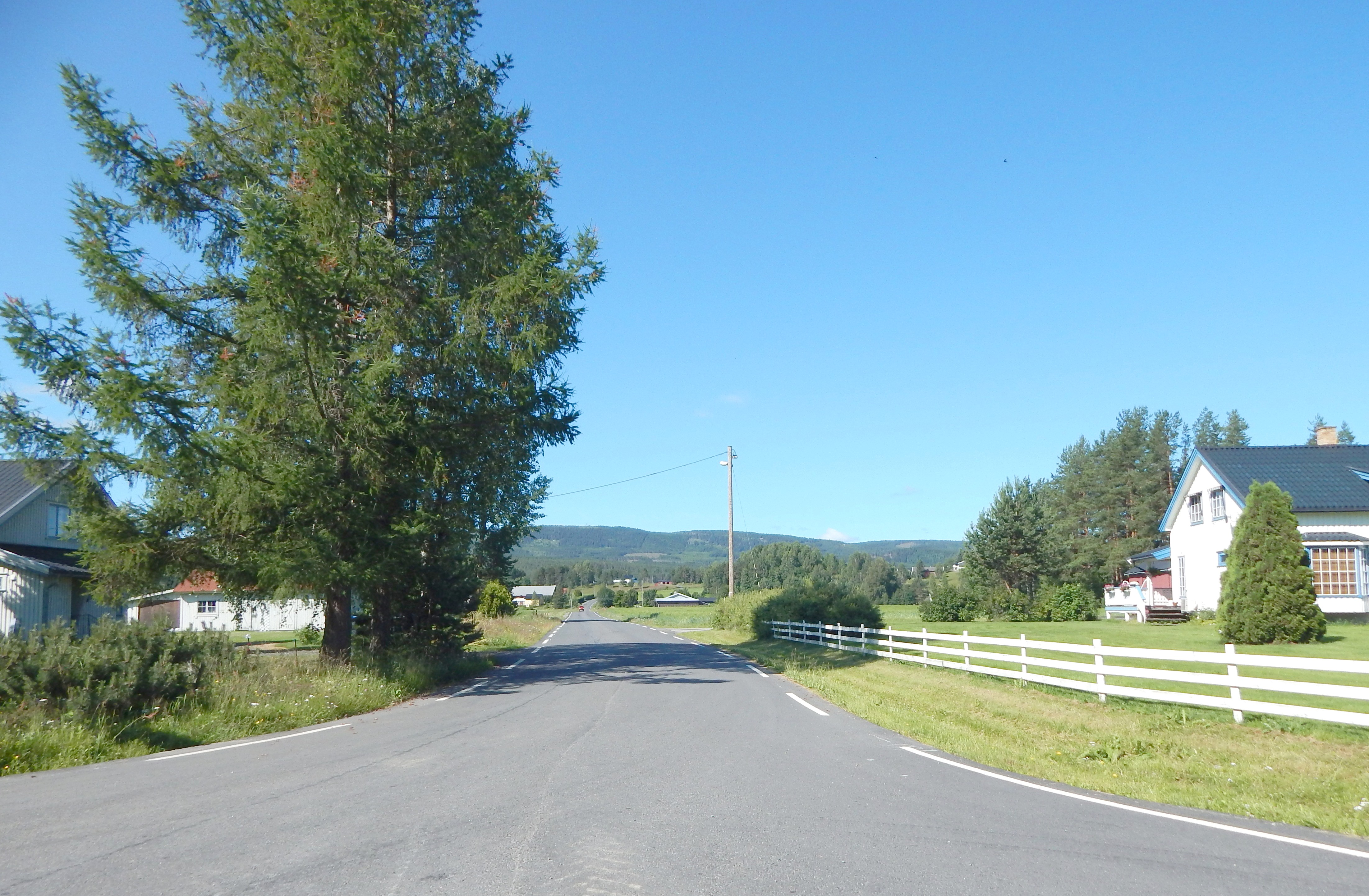 Vestre sundvegen (FV504) ved Vestsidevegen (FV505)